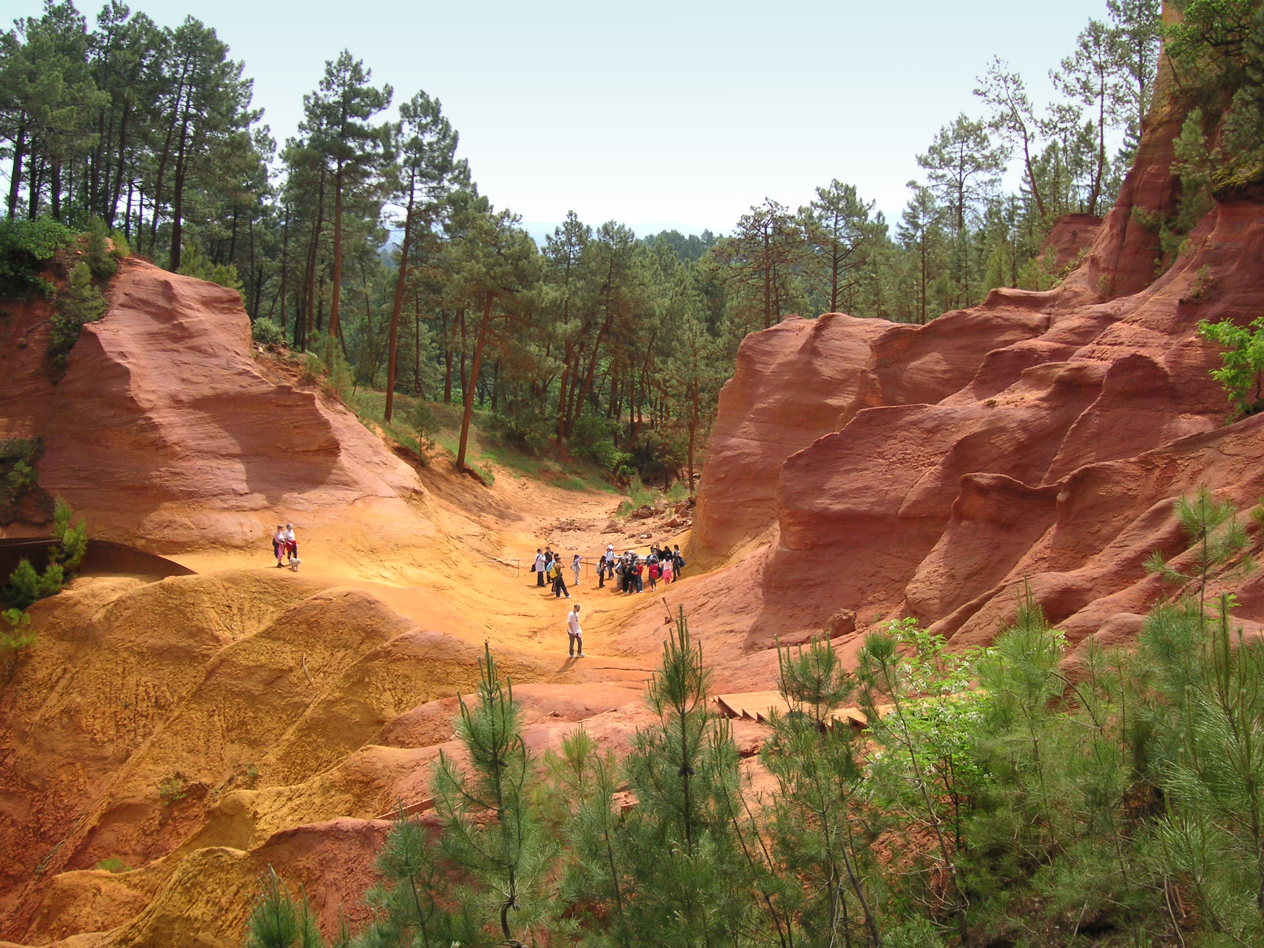 Ockergruben bei Roussillon, Frankreich